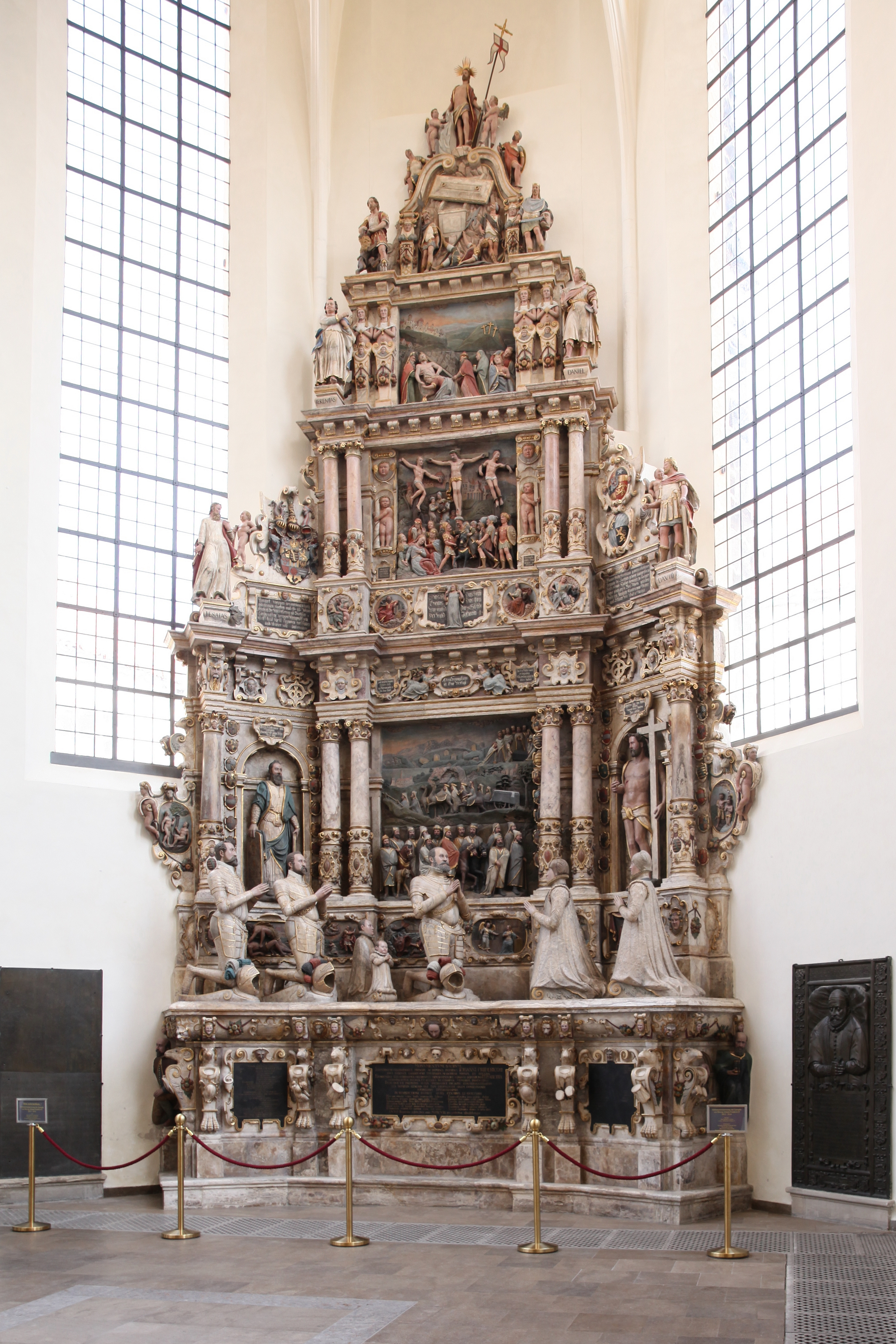 Coburg-Morizkirche-Alabaster-Epitaph